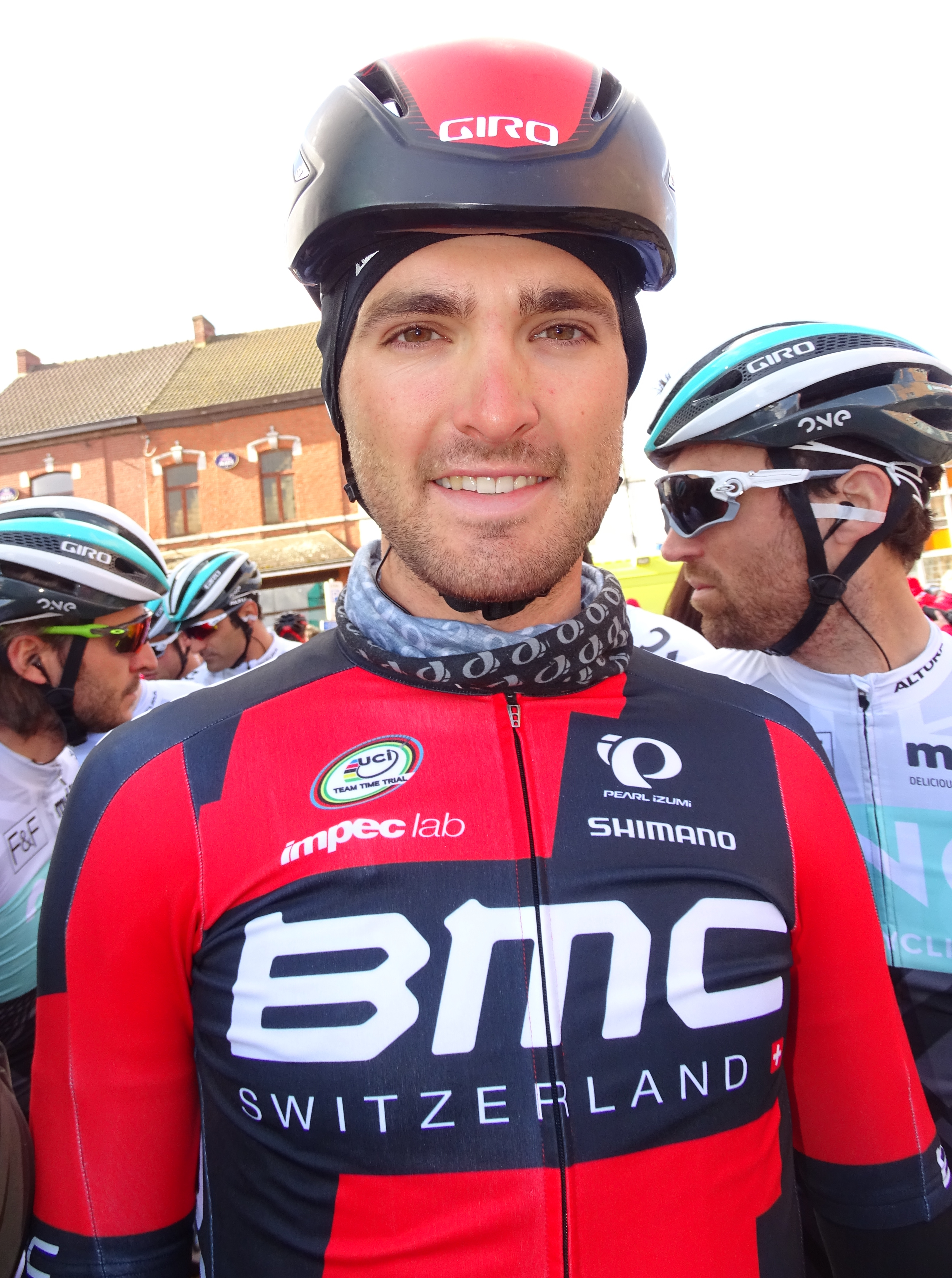 Reportage réalisé le mercredi 2 mars à l'occasion du départ du Samyn des Dames 2016 et du Samyn 2016 à Quaregnon, Belgique.